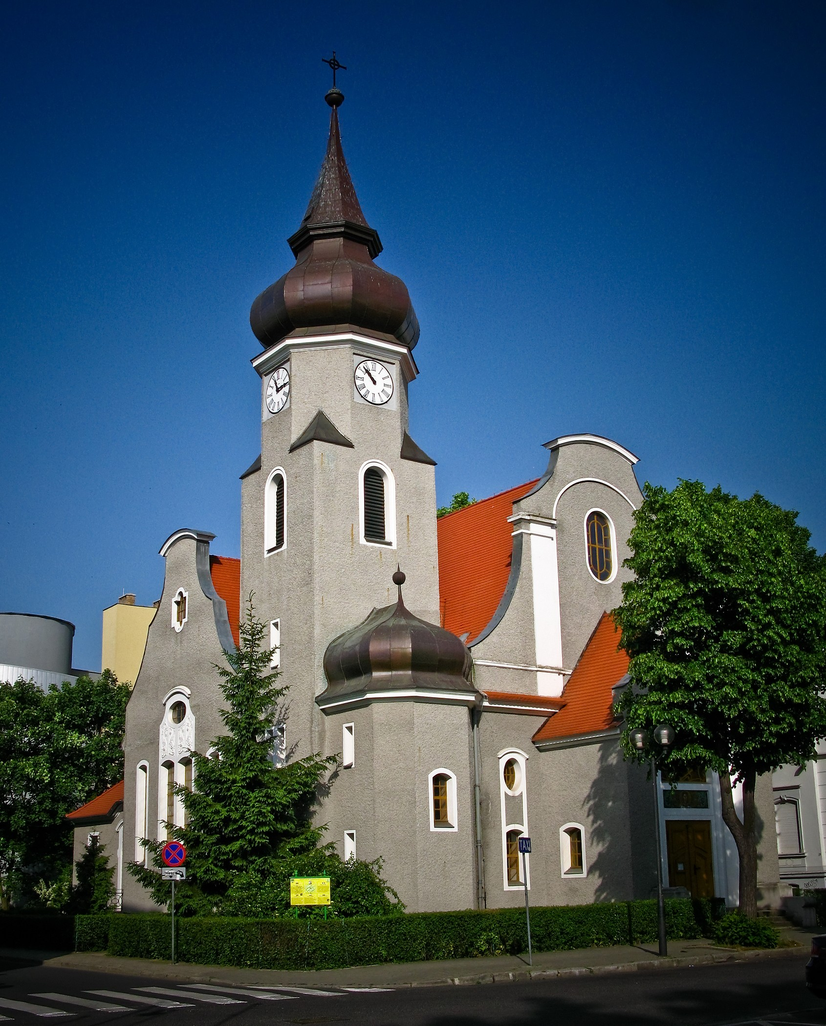 Zielona Góra - kościół ewangelicko-augsburski